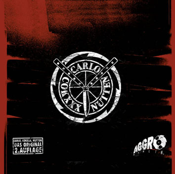 Cover des Albums „Carlo Cokxxx Nutten“ (2. Auflage)